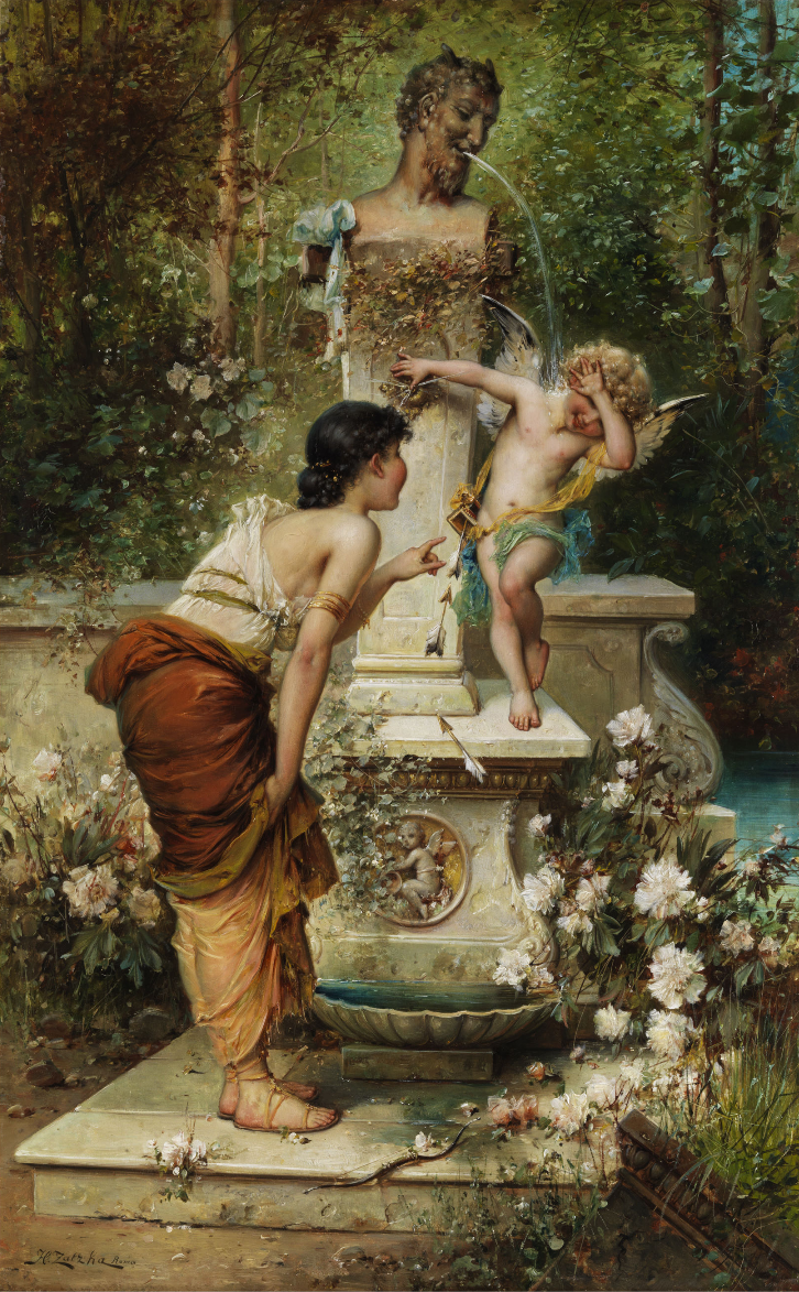 „Bestrafter Übermut“. (bildet mit „Besiegt“ ein Gemäldepaar). Öl auf Holz. 58 x 38 cm. Eines der Bilder mit Aufkleber mit Speditionsnummer und Datierung 1921.